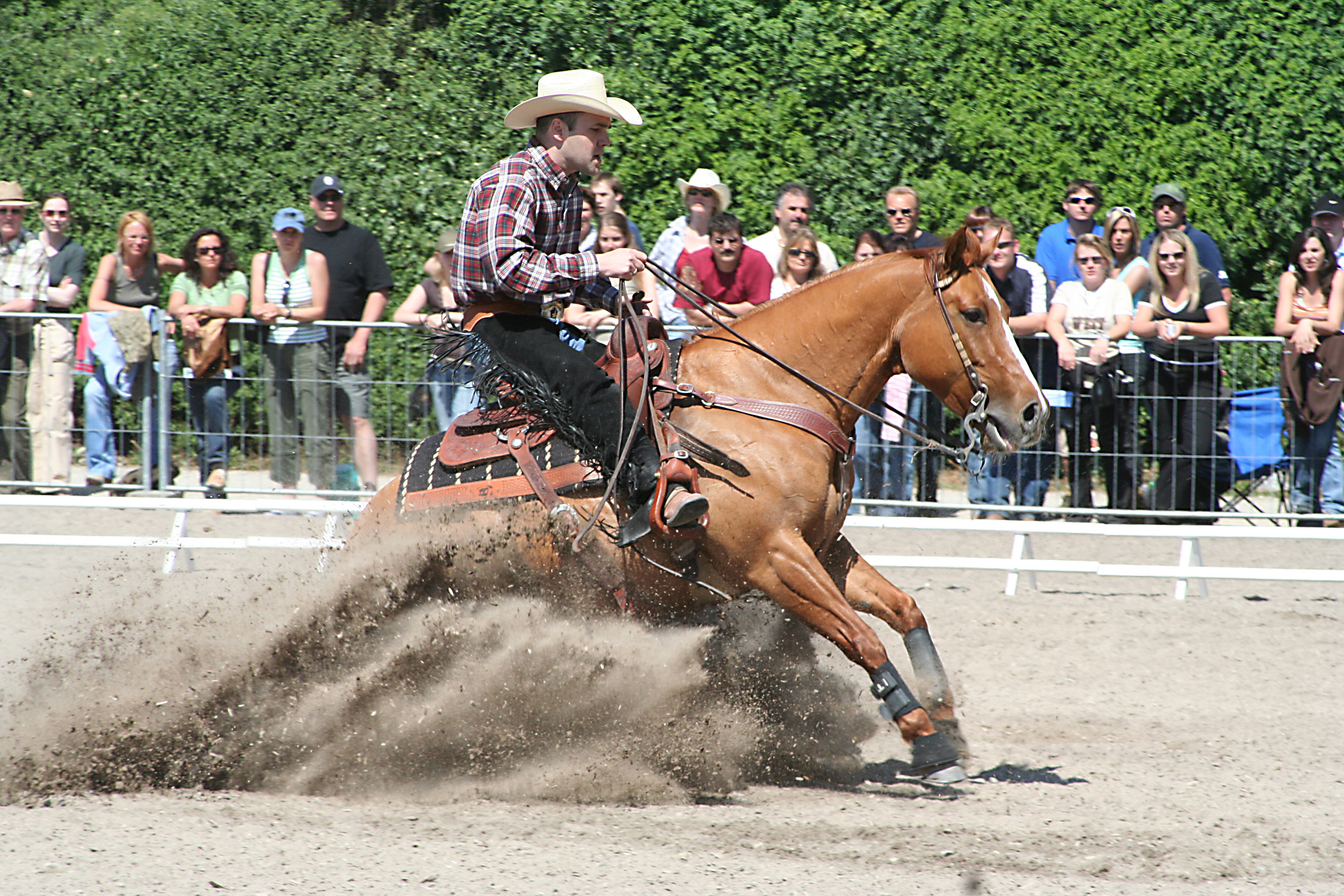 Reining Sliding Stop Mannheim Maimarkt 2007